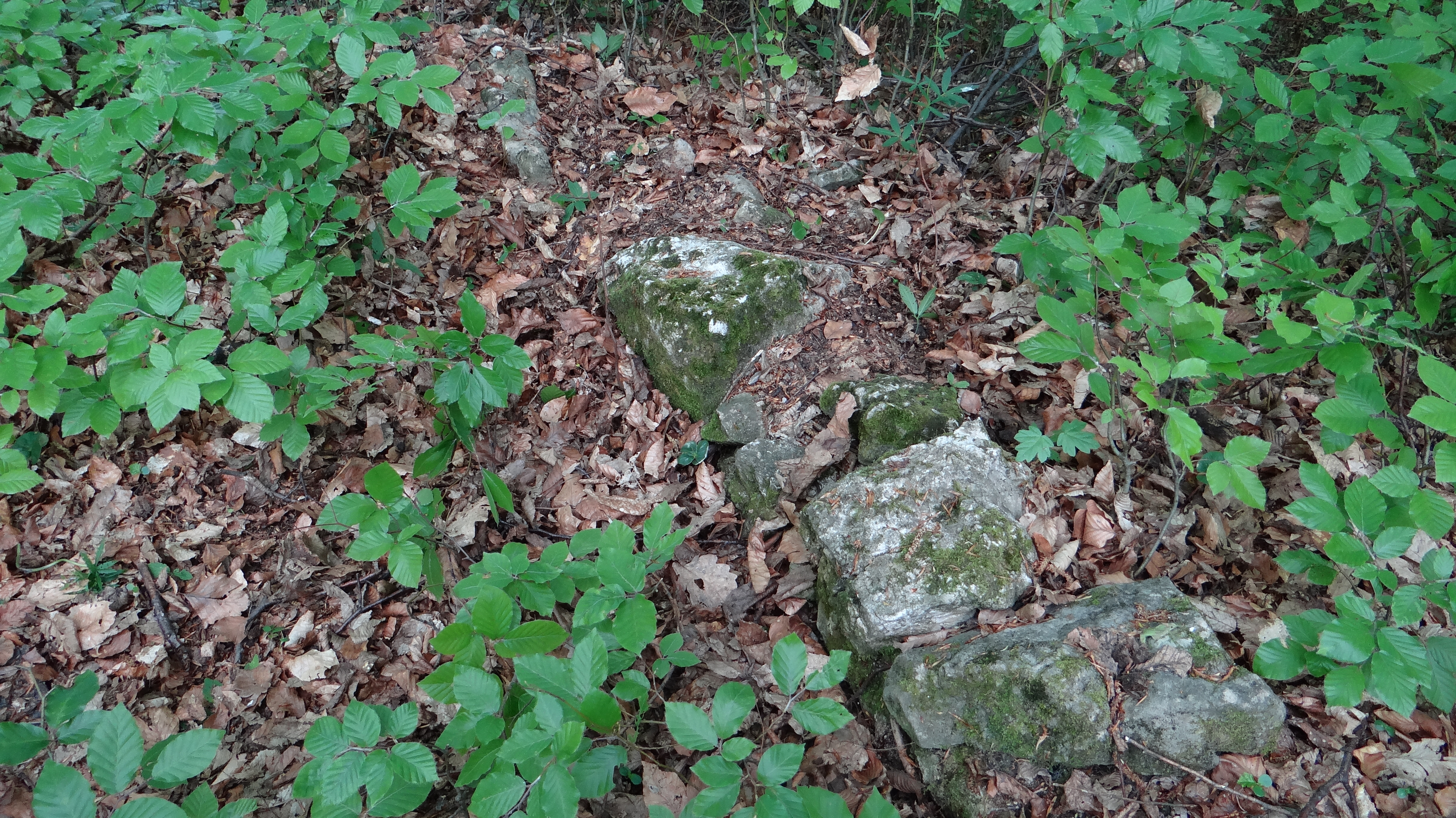 Ruševine gradu Gračeno 2014